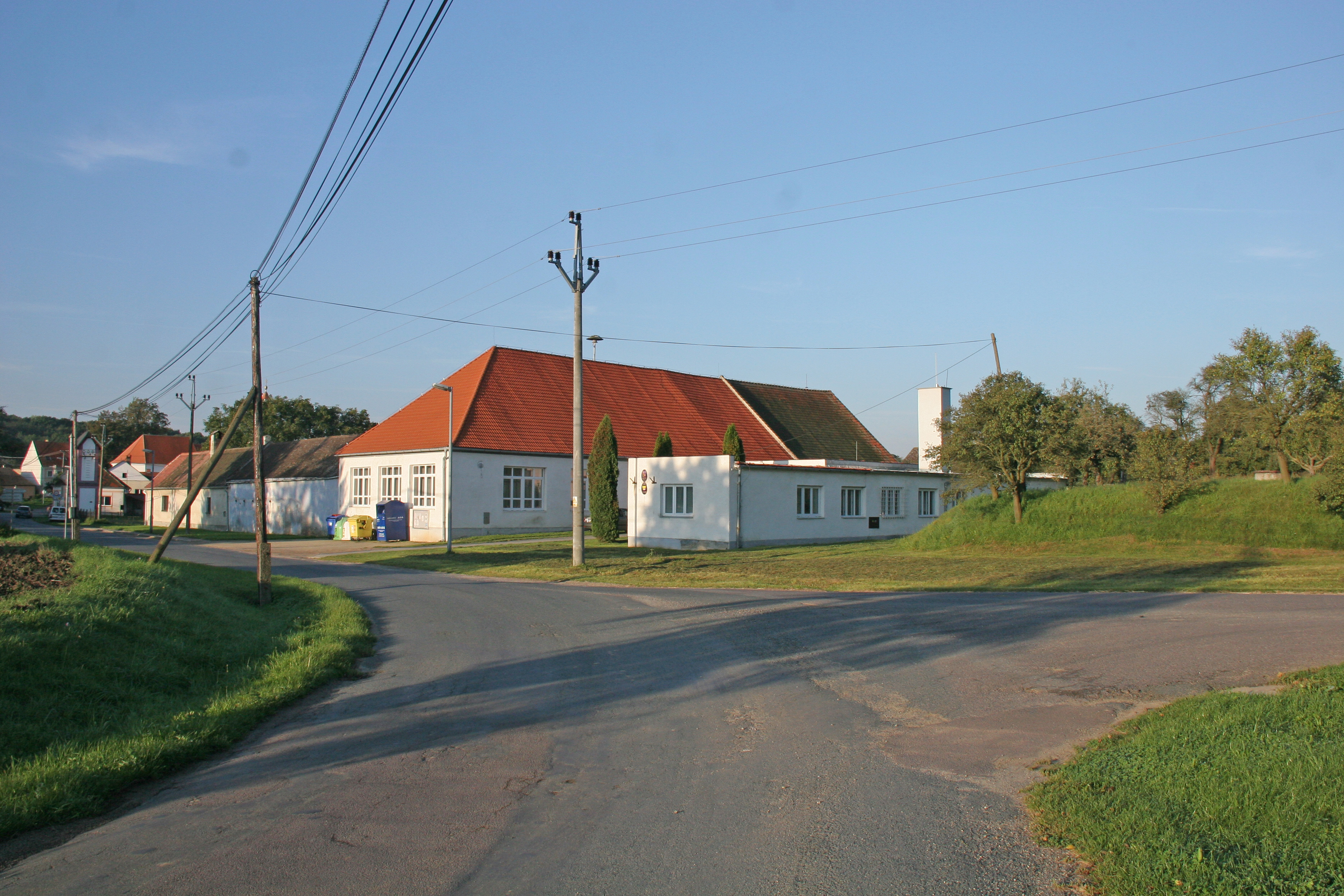 Horní Břečkov obecní úřad